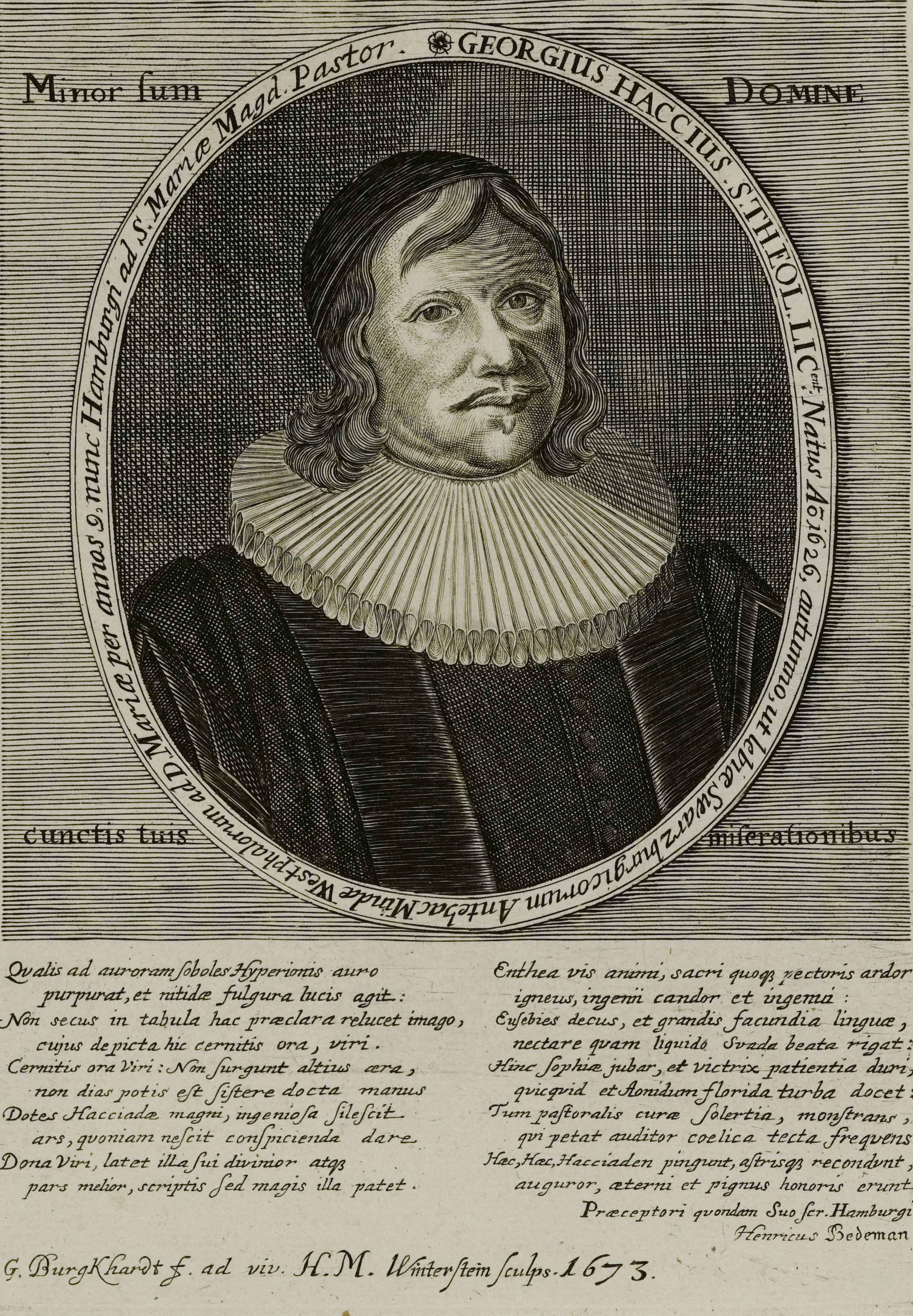 Bildnis von Georg Haccius